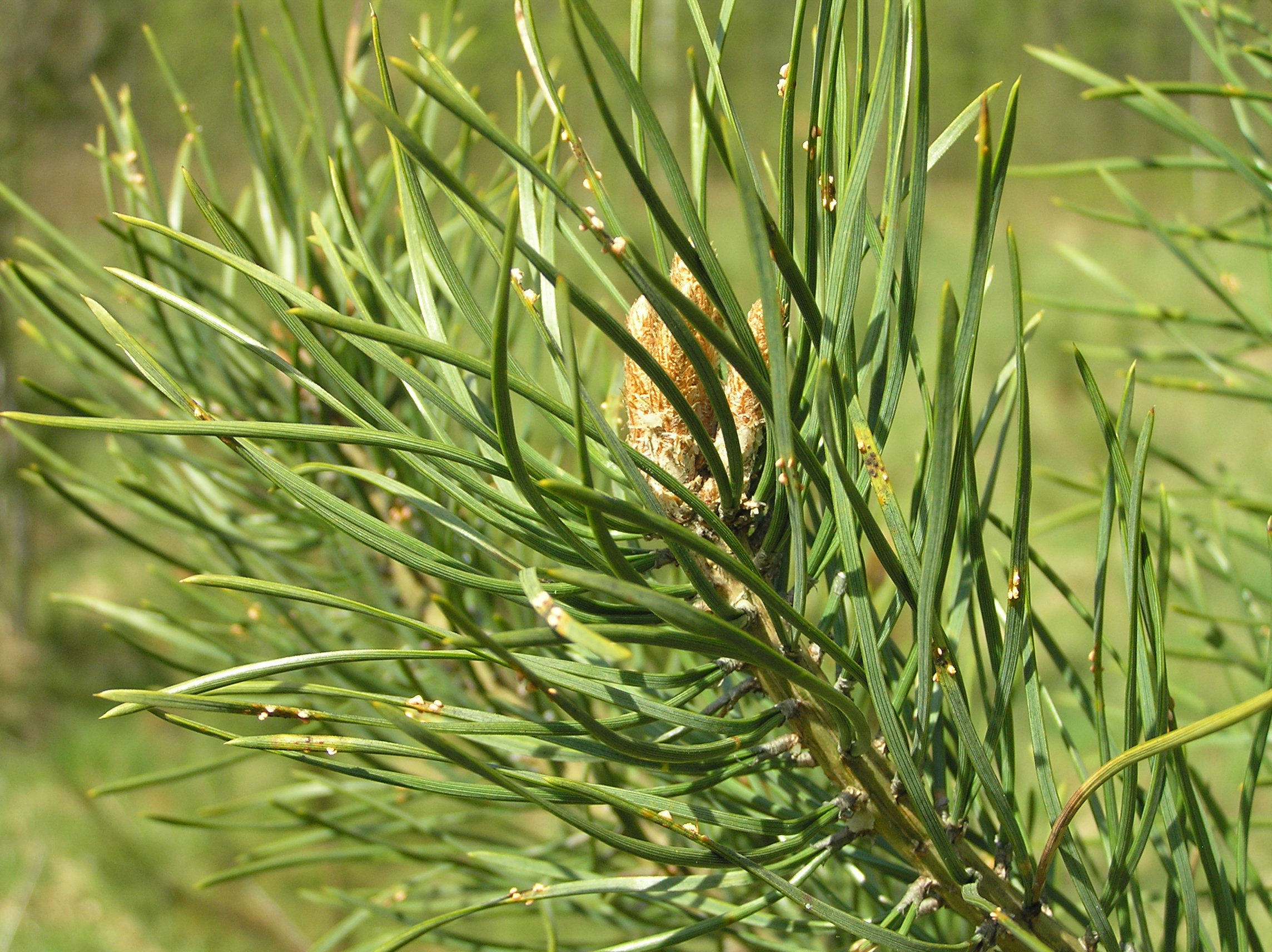 Coleosporium tussilaginis on Pinus sylvestris, Białowieża, Polska